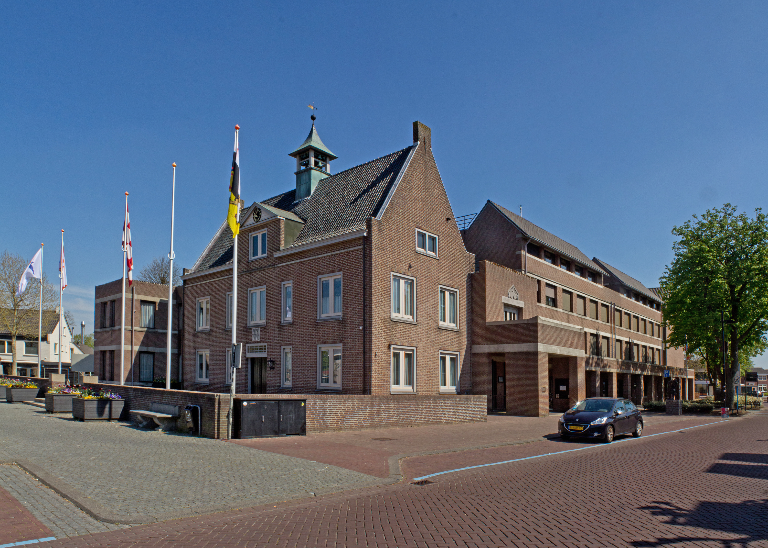 Zicht op een deel van het raadhuis en gemeentehuis van Someren. Van 1976/81 sterk verbouwd en uitgebreid in Bossche Schoolstijl door architect Jan de Jong.